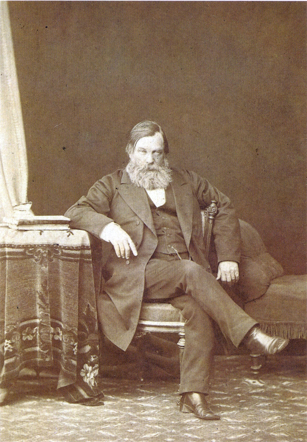 Мельников-Печерский, Павел Иванович